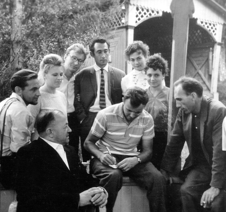 сотрудники КБ Южное на встрече с Юрием Гагариным, март 1962 года, Крым